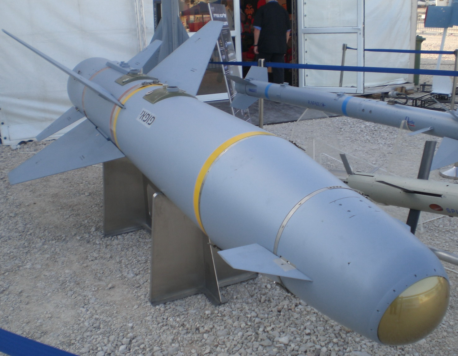 AGM-142 Popeye missile